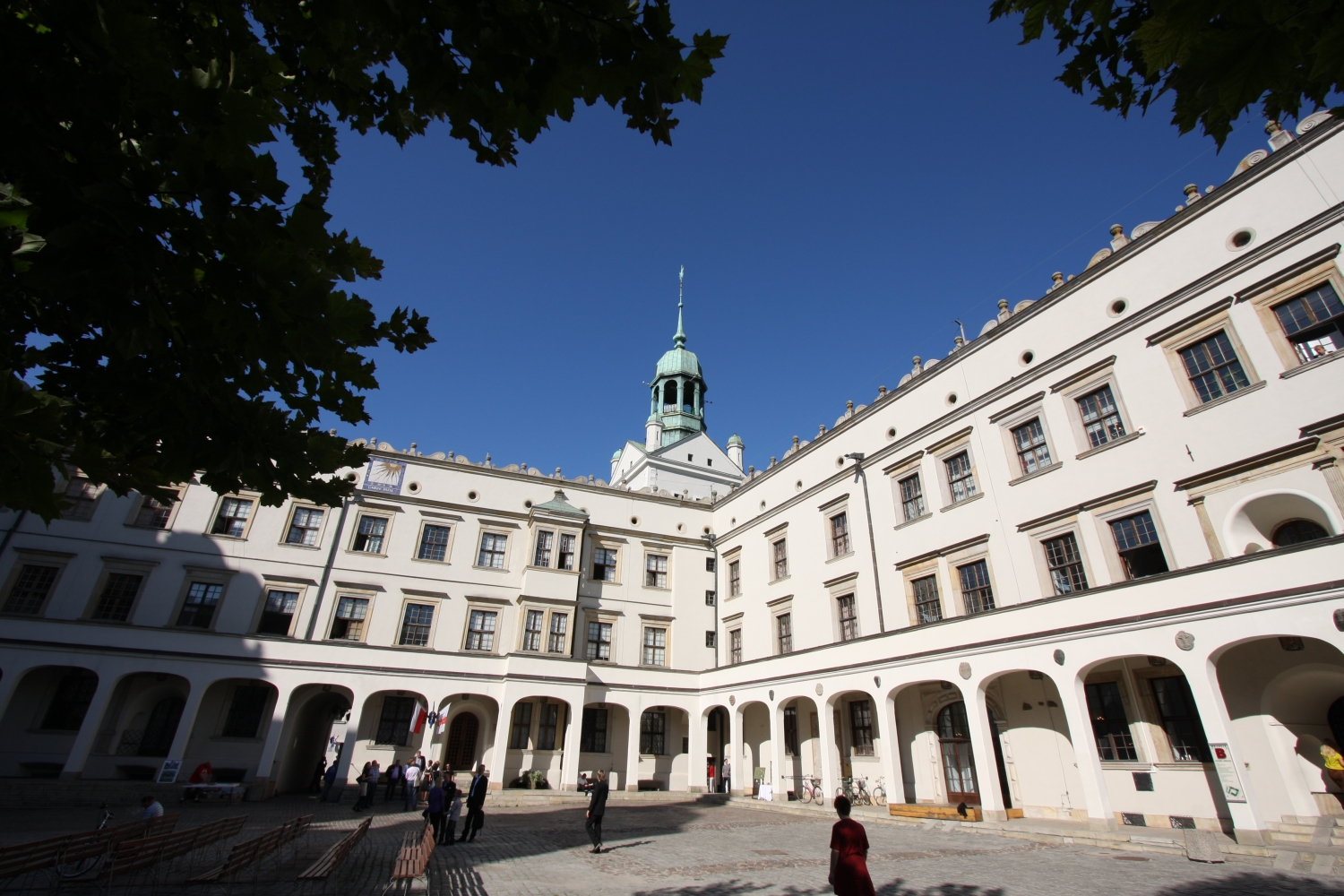 Szczecin, zamek książąt pomorskich, mur., XV-XIX, po 1945